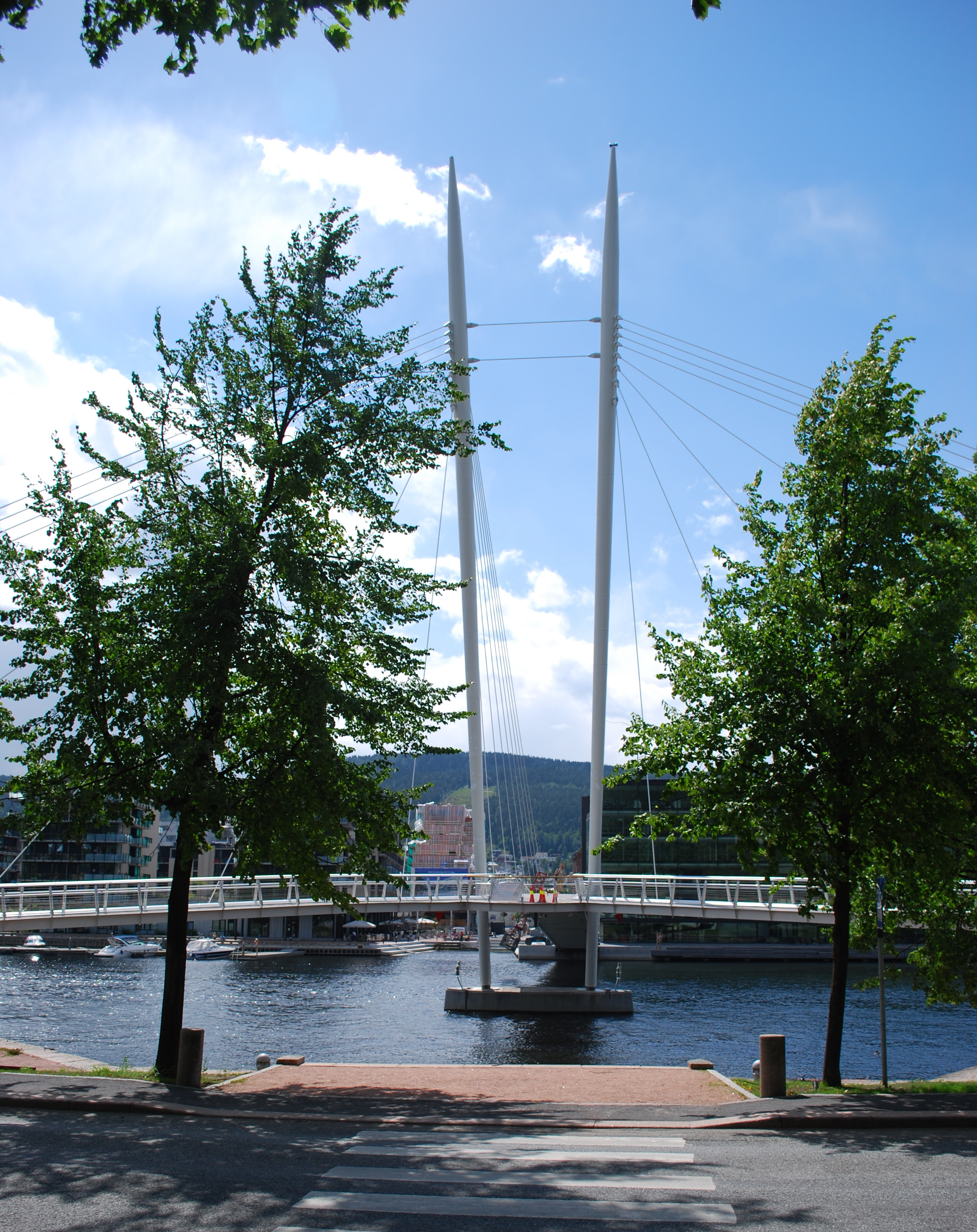 Ypsilon bru sett fra østsiden av Drammenselva